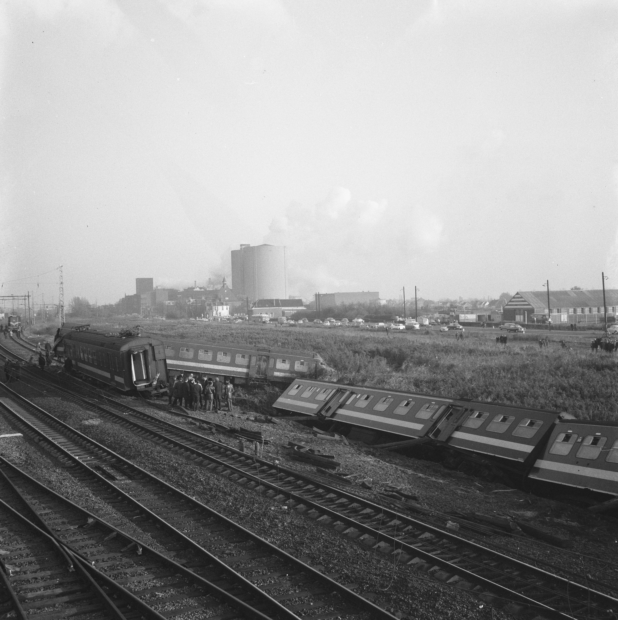 Collectie / Archief : Fotocollectie Anefo Reportage / Serie : Ravage na de ontsporing van een personentrein ter hoogte van Halfweg Beschrijving : treinen, spoorwegongevallen Datum : 2 november 1966 Locatie : Halfweg, Noord-Holland Trefwoorden : spoorwegongevallen, treinen Fotograaf : Evers, Joost / Anefo Auteursrechthebbende : Nationaal Archief Materiaalsoort : Negatief (zwart/wit) Nummer archiefinventaris : bekijk toegang 2.24.01.03 Bestanddeelnummer : 919-7448